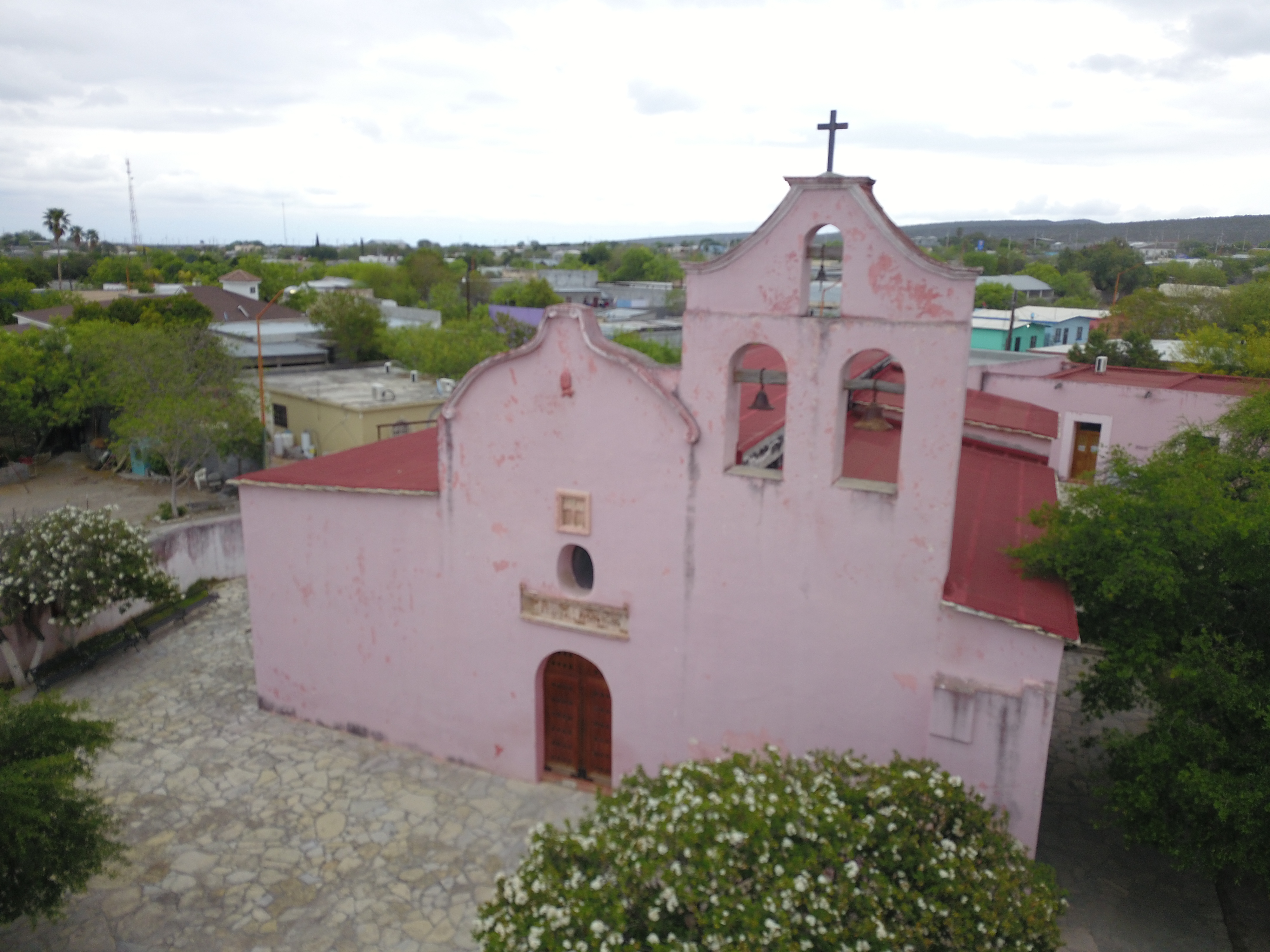 El edificio de la misión de Nuestra Señora de los Dolores actualmente alberga el Museo Lampazos